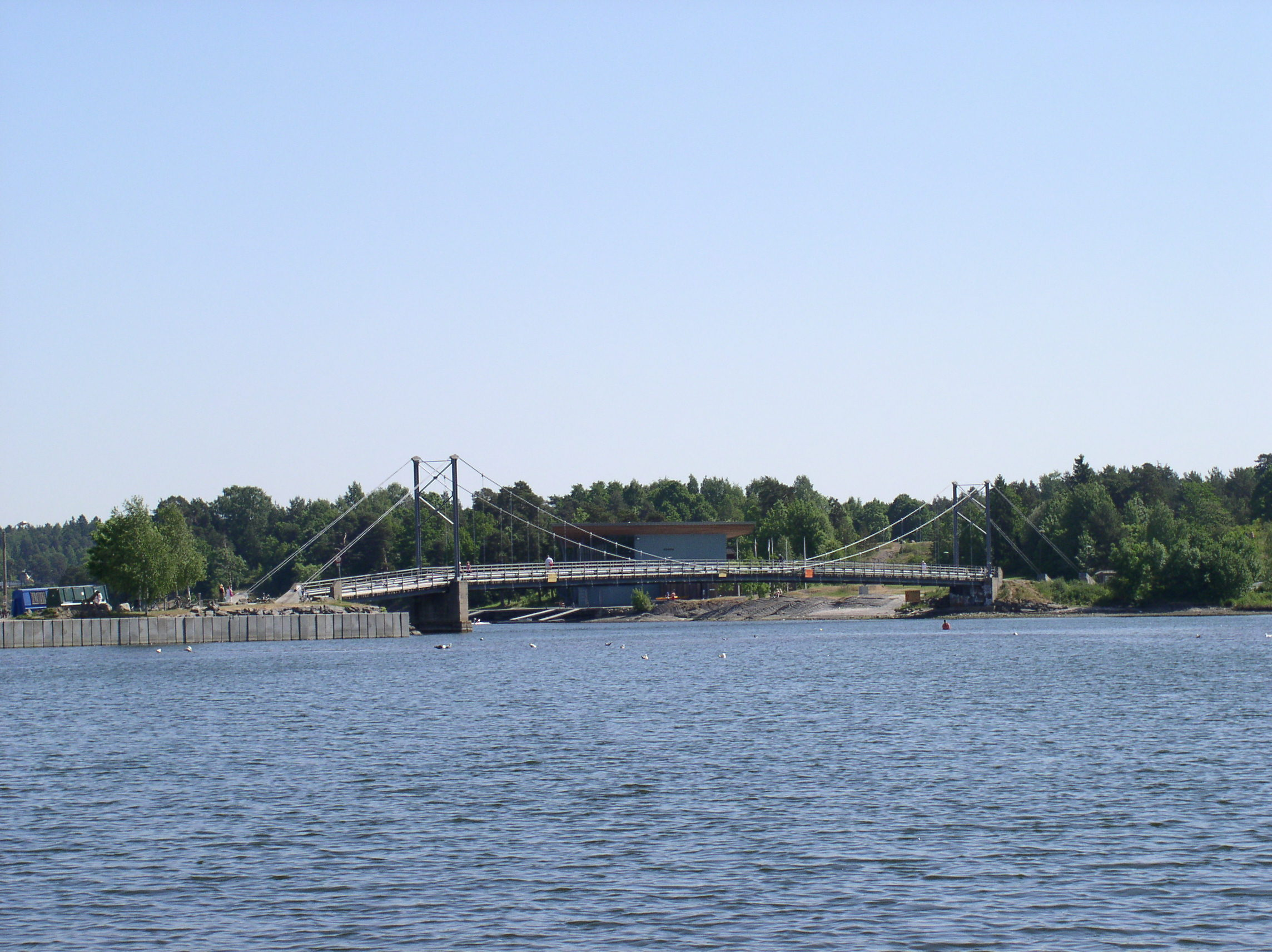 Kalvøybrua fra Kadettangen til Kalvøya i Bærum, i bakgrunnen sees Båtsportens hus.